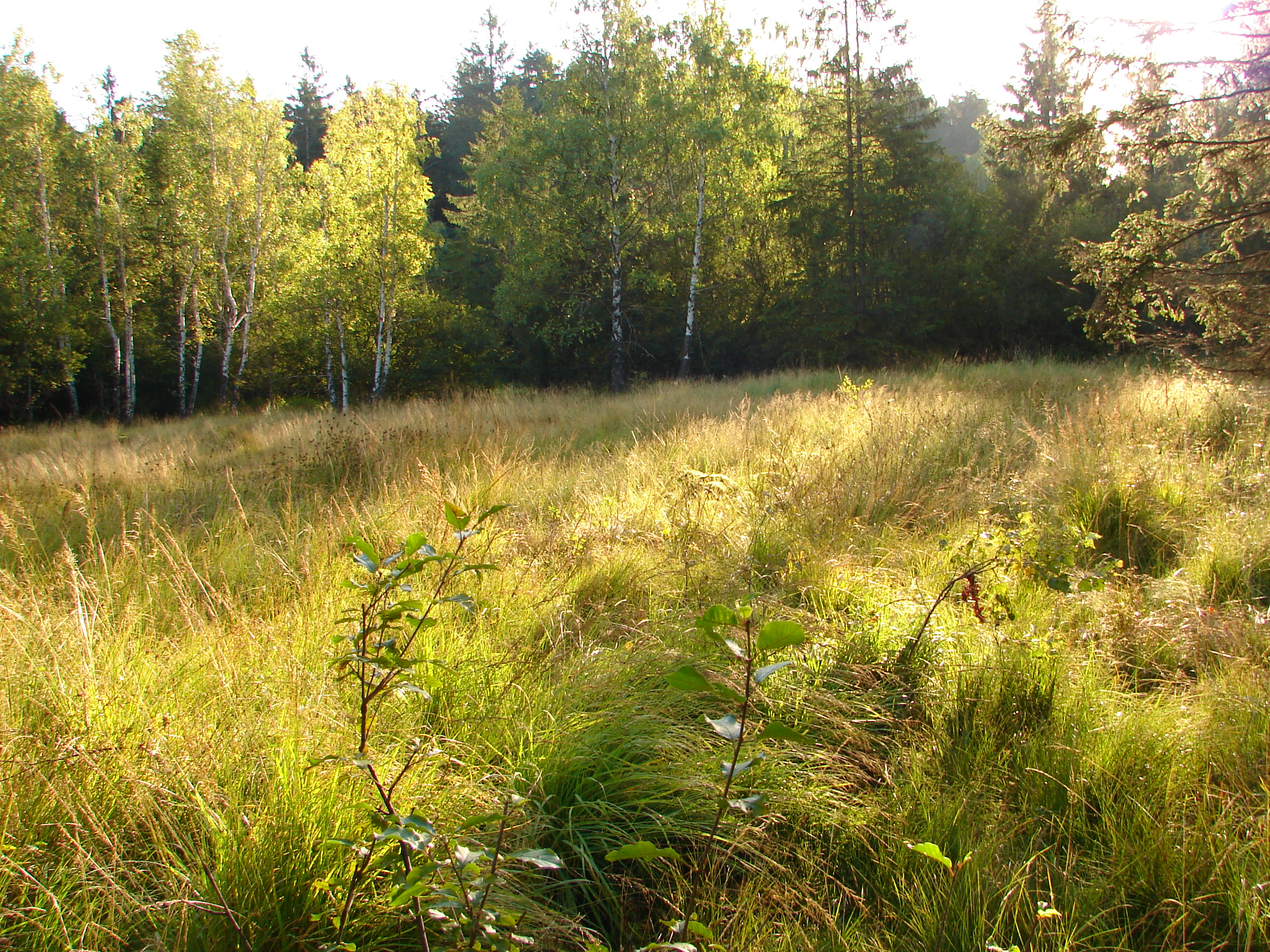 PP Ještěnice - rašelinné porosty s břízou bělokorou v pozadí